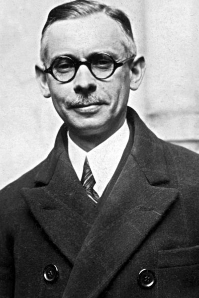 Portrait de Henri Delaunay, secrétaire général de la Fédération gymnastique et sportive des patronages de France, puis de la Fédération française de football